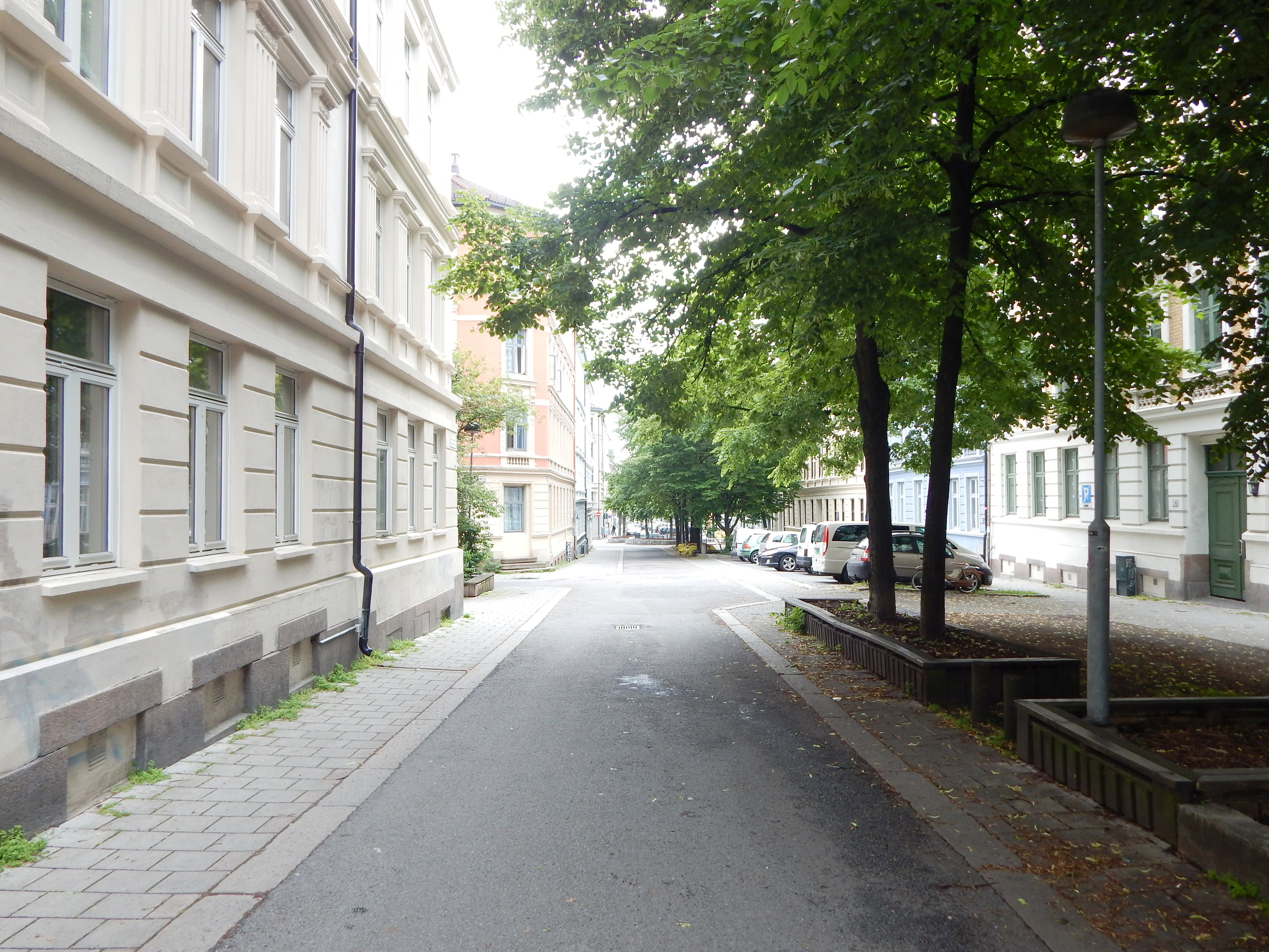 Gatetun i Rathkes gate